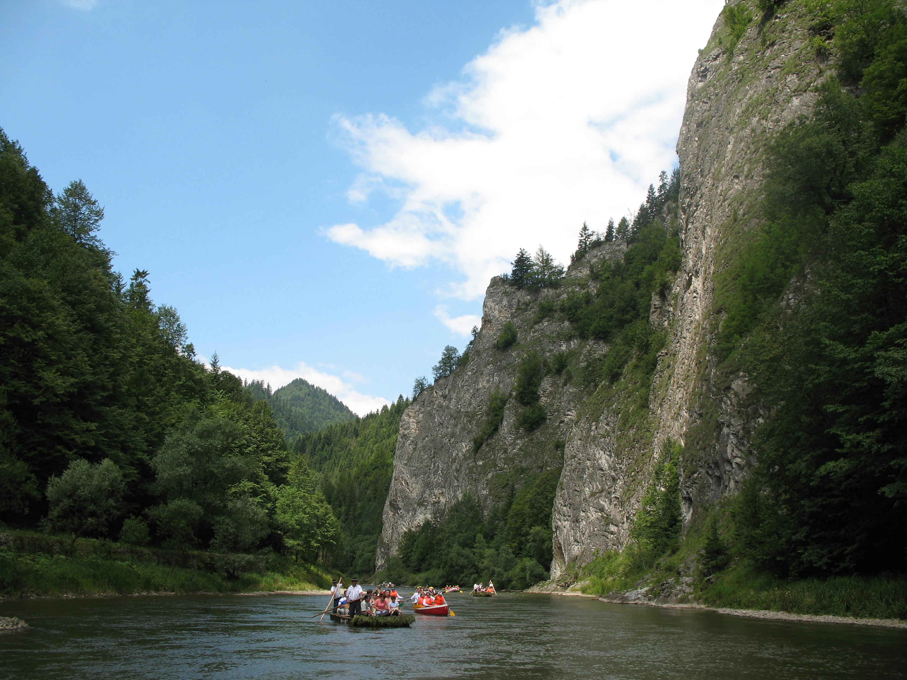 Pieniny, Poland